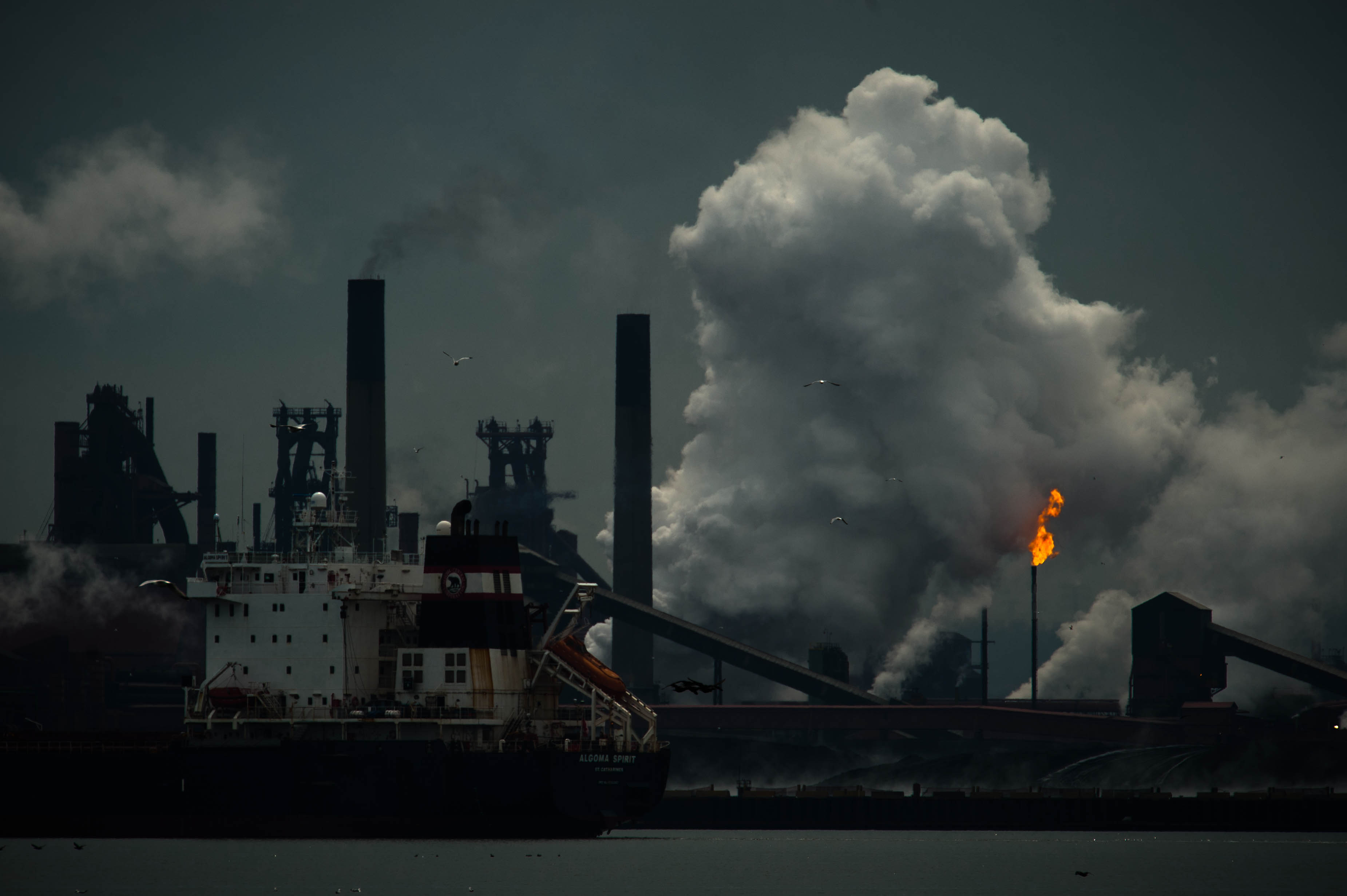 Hamilton Harbor